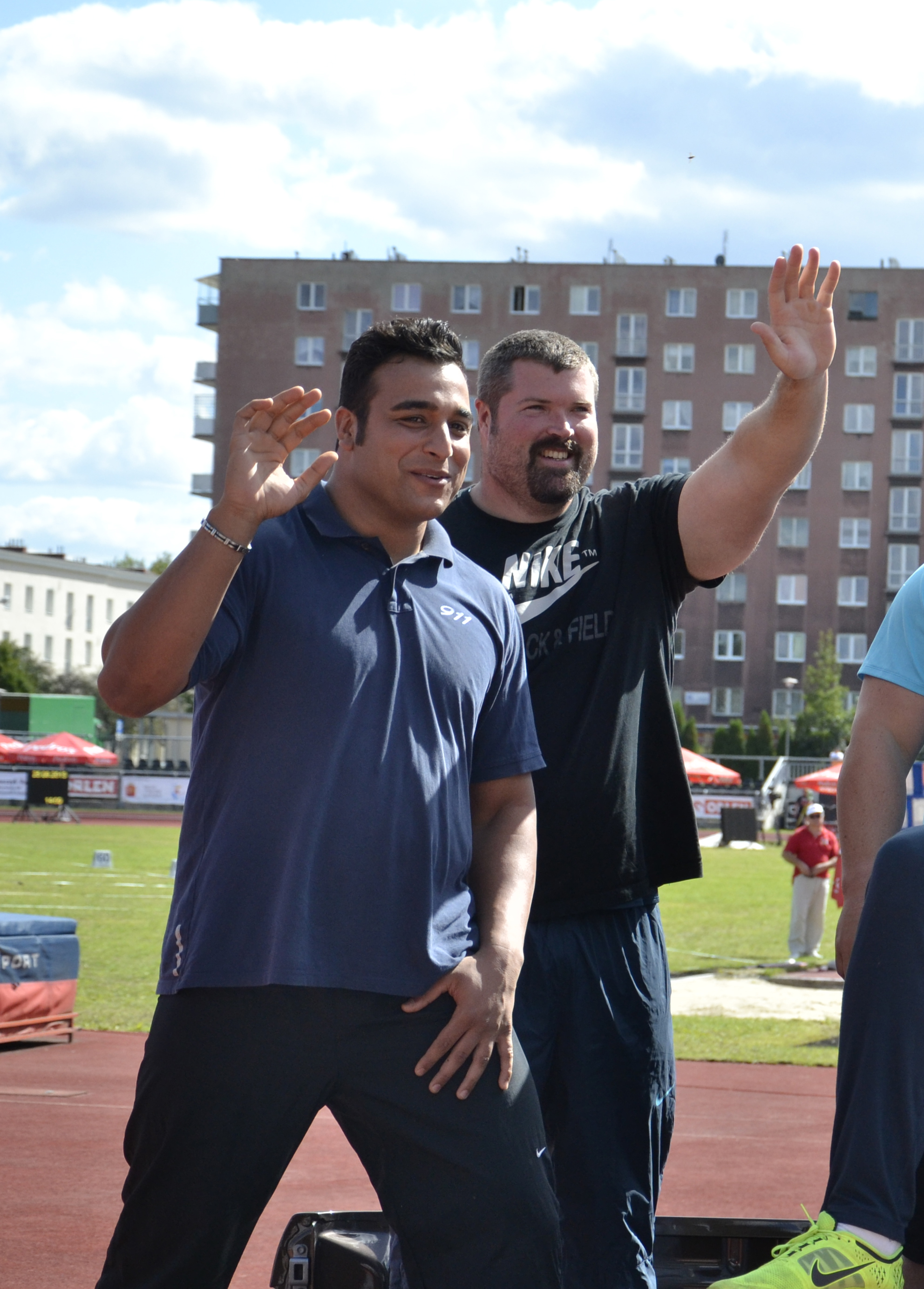 Ehsan Hadadi - Irański dyskobol